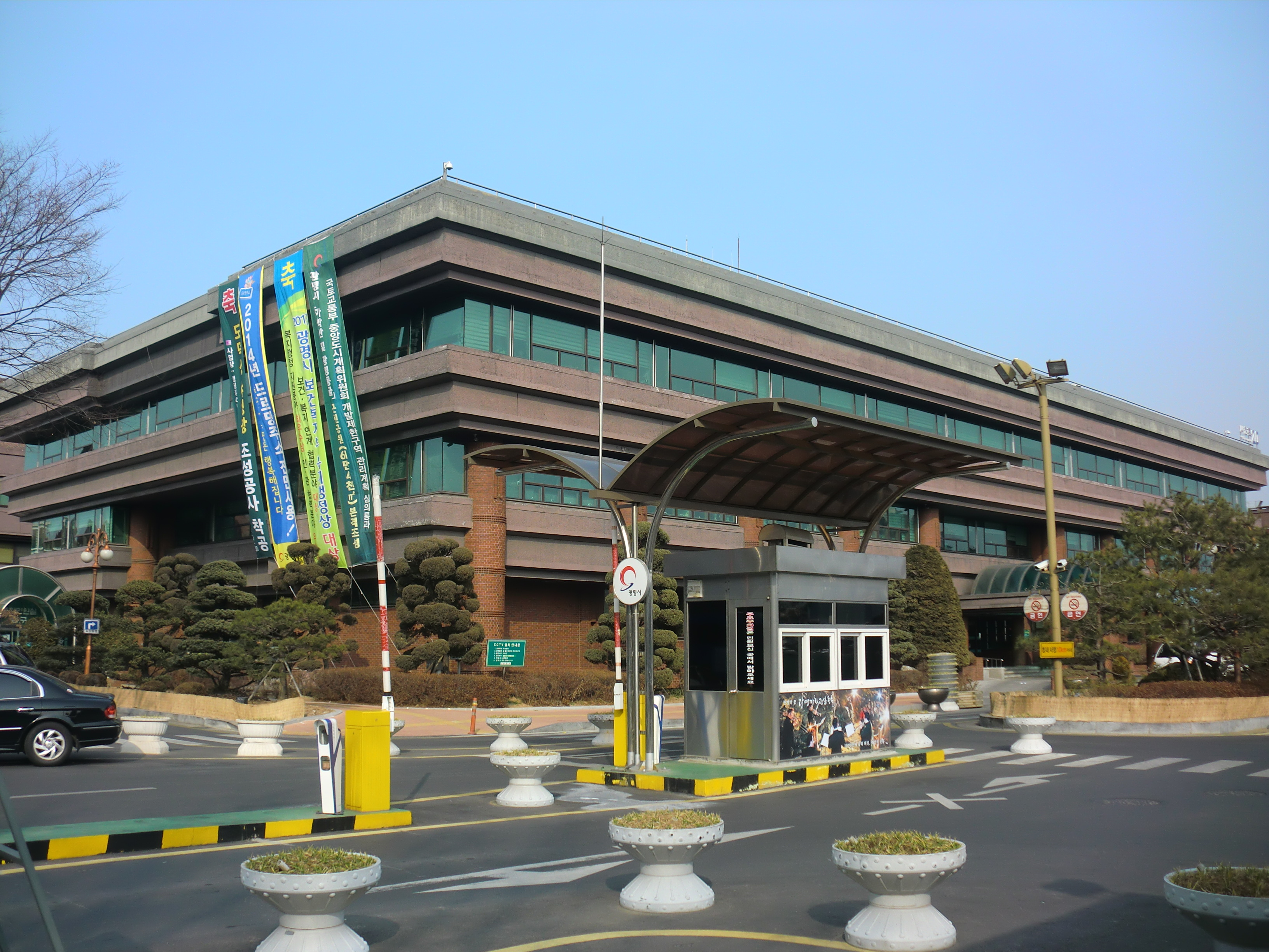 경기도 광명시에 있는 광명시청